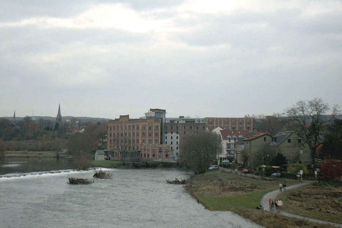 Birschels Mühle in Hattingen in November 2004